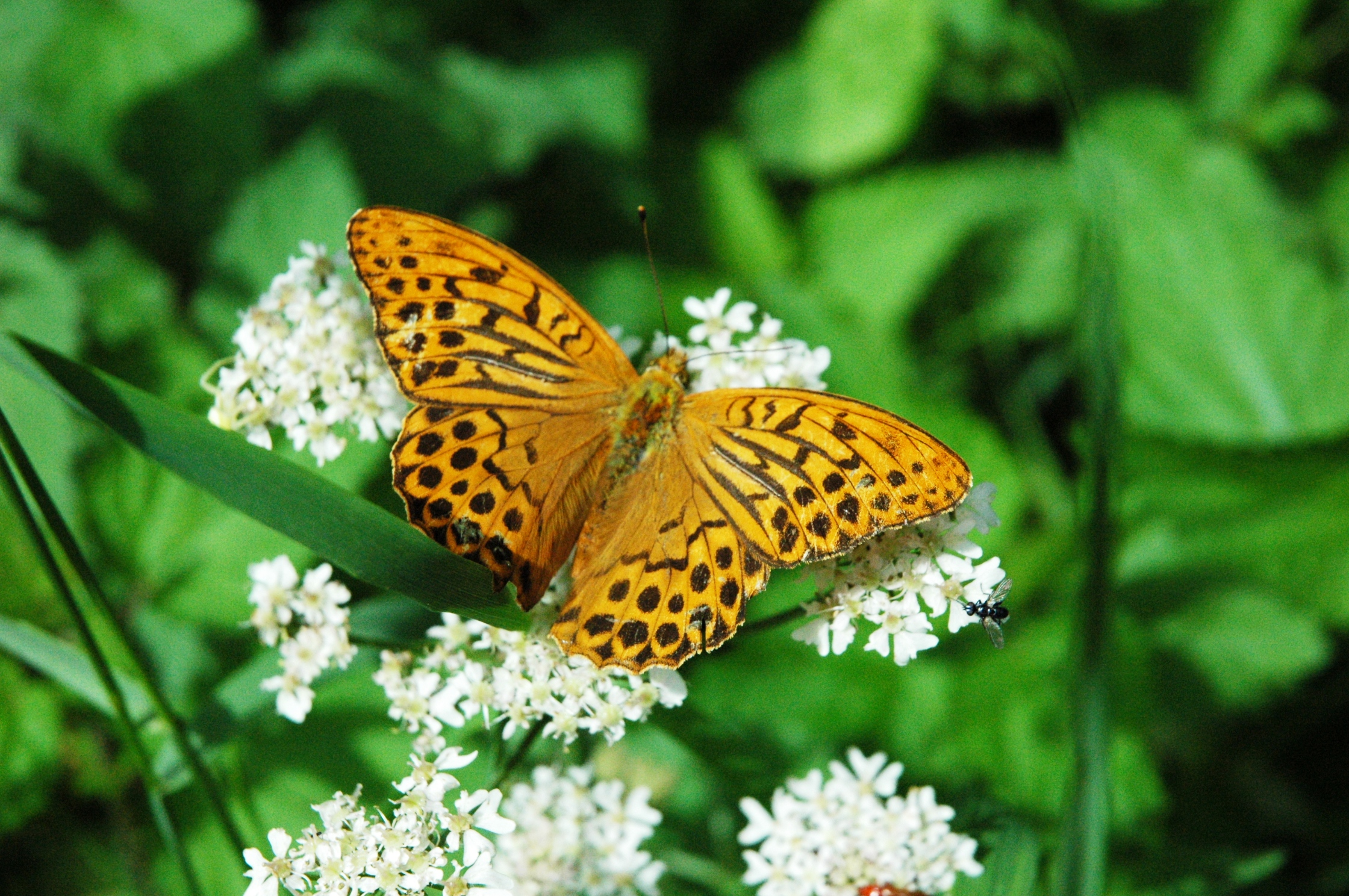 Kaisermantel, fotografiert im Pfälzer Wald